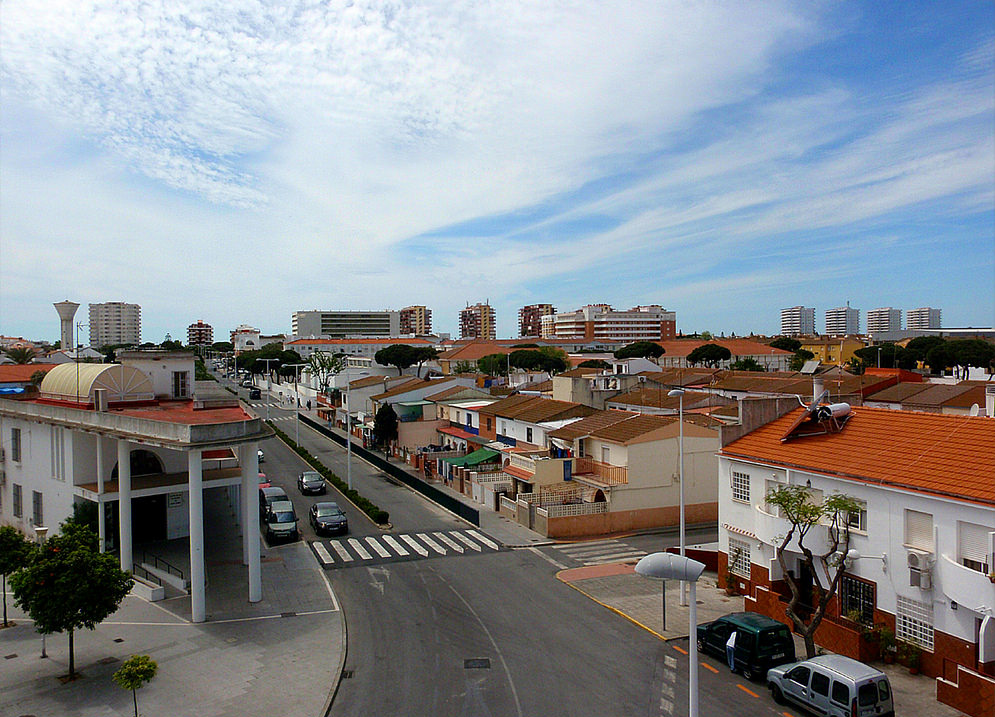 Punta Umbría (Huelva) (Spain)